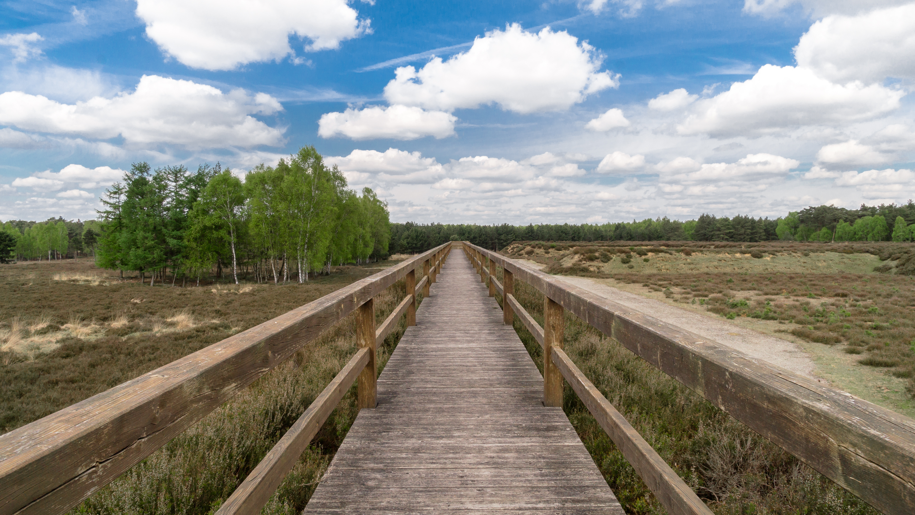 Steelenweg im Naturschutzgebiet „Brachter Wald“, der im Naturpark Maas-Schwalm-Nette liegt. Dieser Weg führt an Heidelandschaften und ehemaligen Munitionsdepots vorbei. Mehr dazu hier